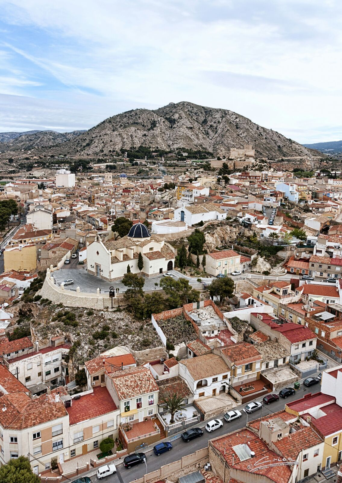 En la imagen podemos contemplar una vista general de las ermitas, el castillo y la iglesia de San Bartolomé con la Sierra del Caballo al fondo.